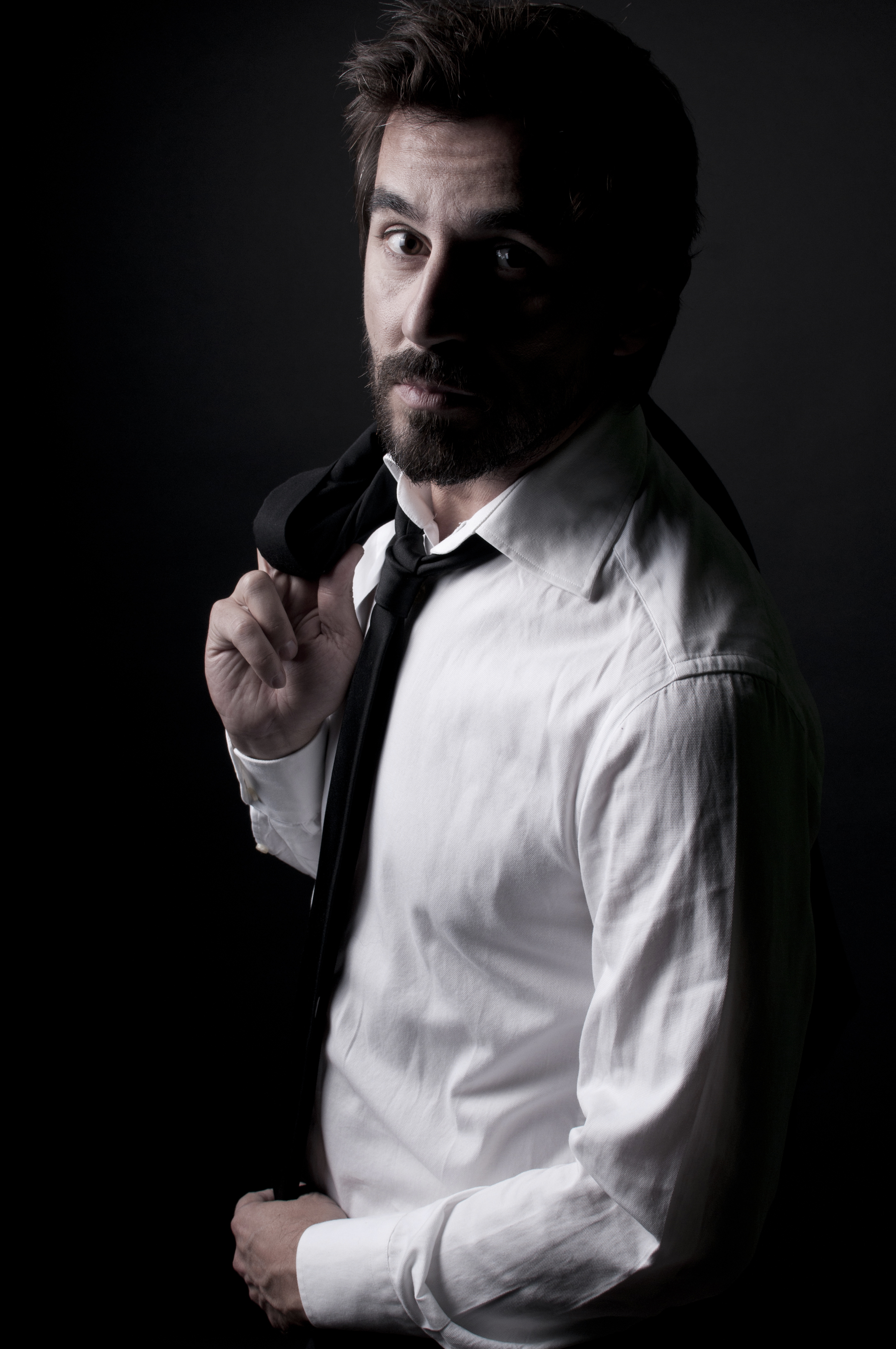 Actor y presentador de televisión.